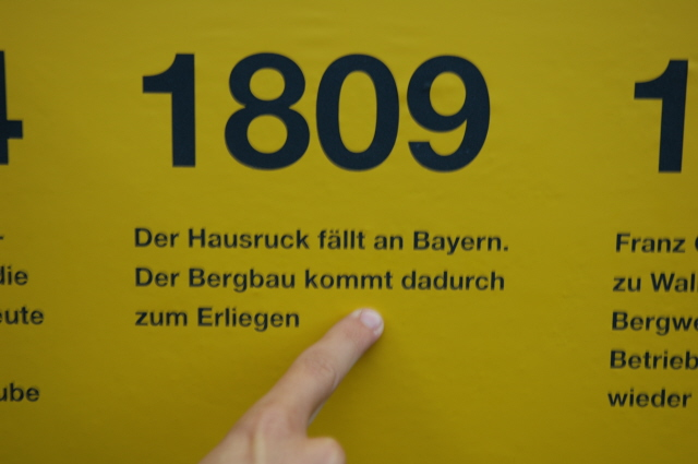 Zeittafel an der Landessausstellung "Kohle und Dampf" in Ampflwang 2006.